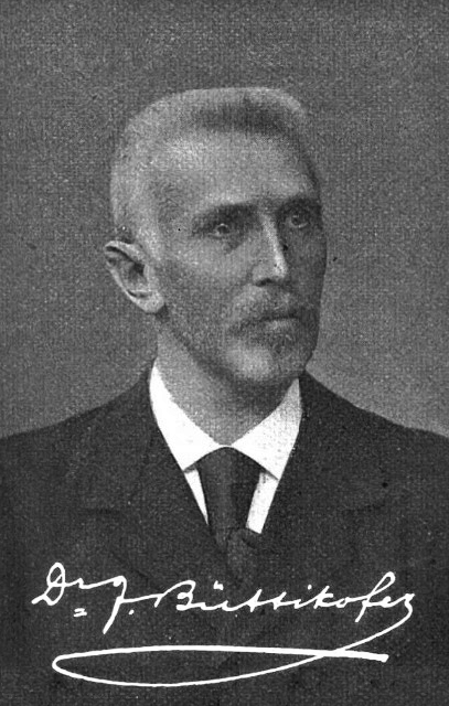 Johann Büttikofer (1850–1927) Zoologe. Aufnahme ca. 1908